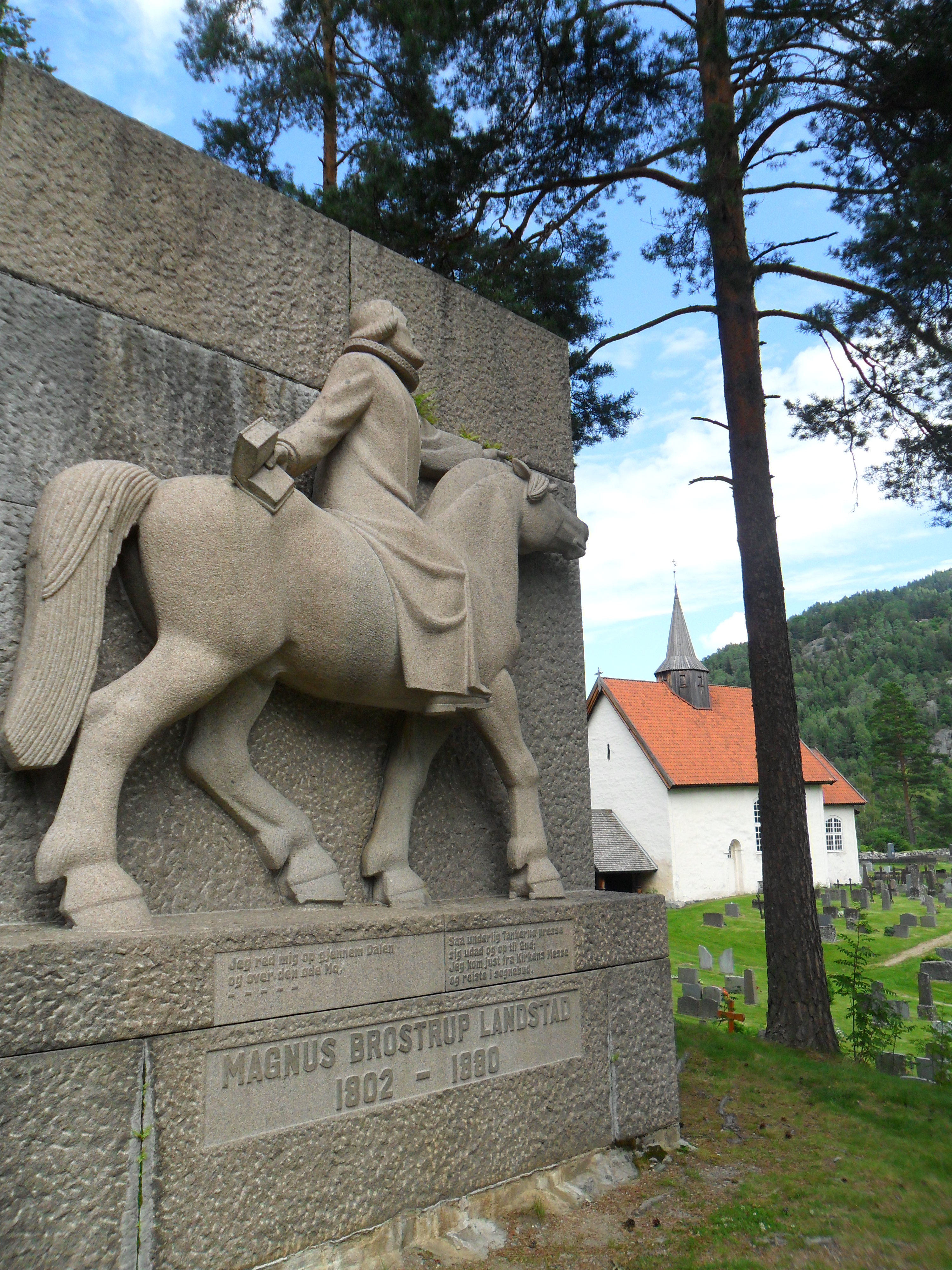 Seljord kirke i Seljord kommune, Telemark. Utført av Anne Grimdalen (1899 - 1961).